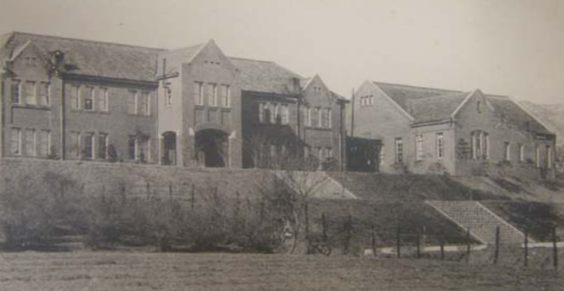 초창기의 경성고등상업학교